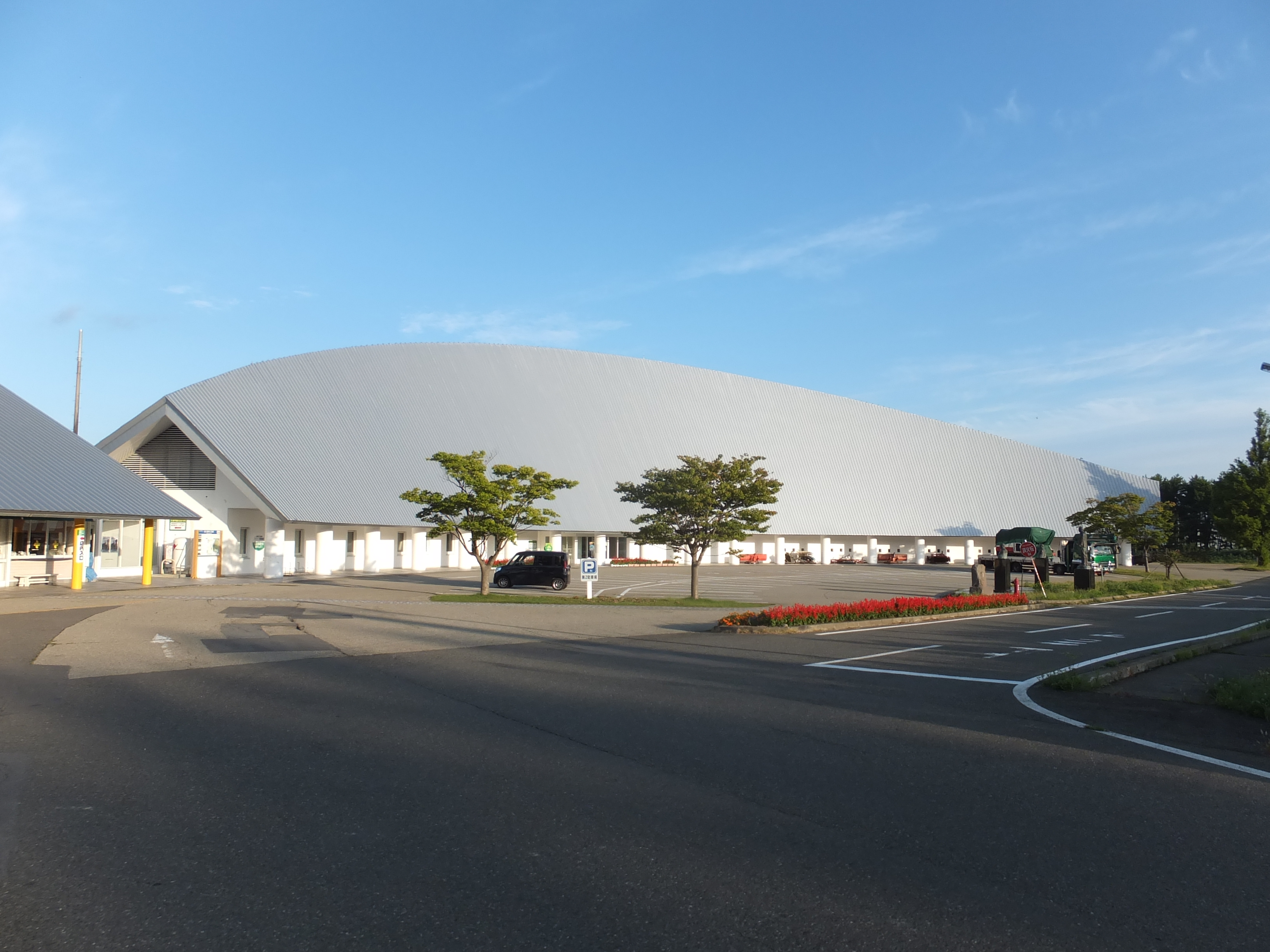 大潟村干拓博物館。日本で初めての干拓に関する博物館として2000年に開館した。